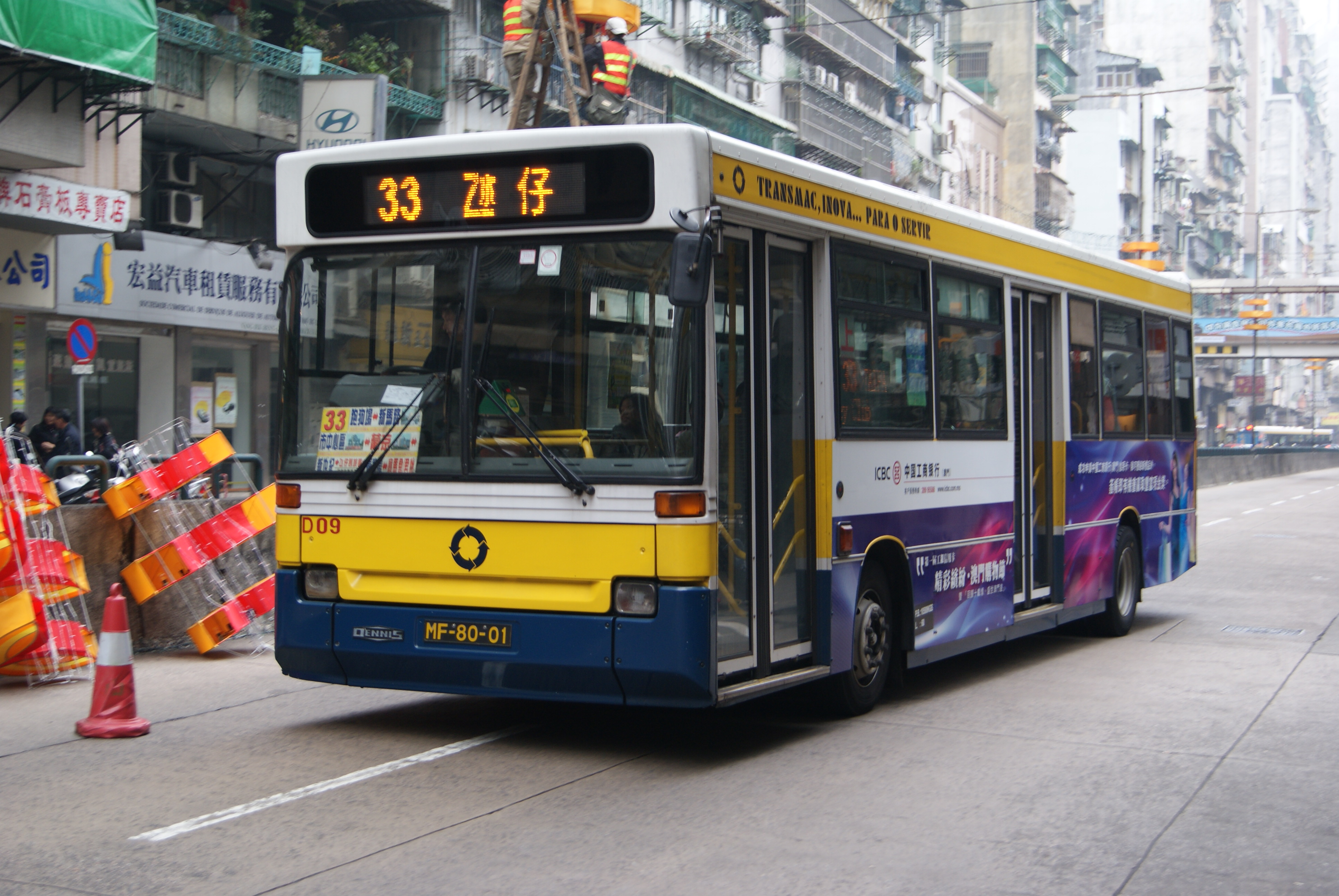 新福利巴士D09行駛33路線。